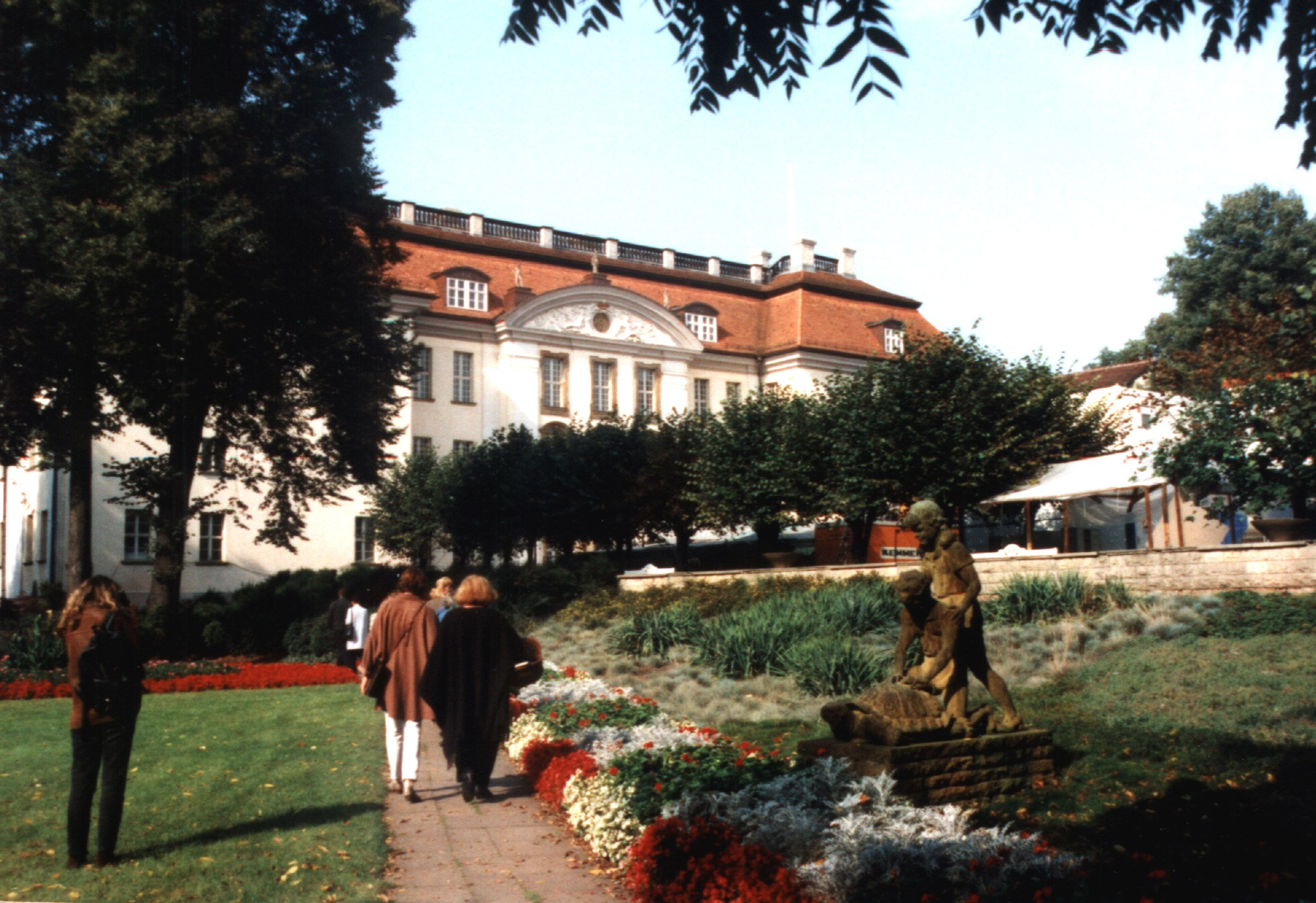 Ein Teil der Schlossinsel Köpenick mit Park und Blick auf das Schloss Köpenick